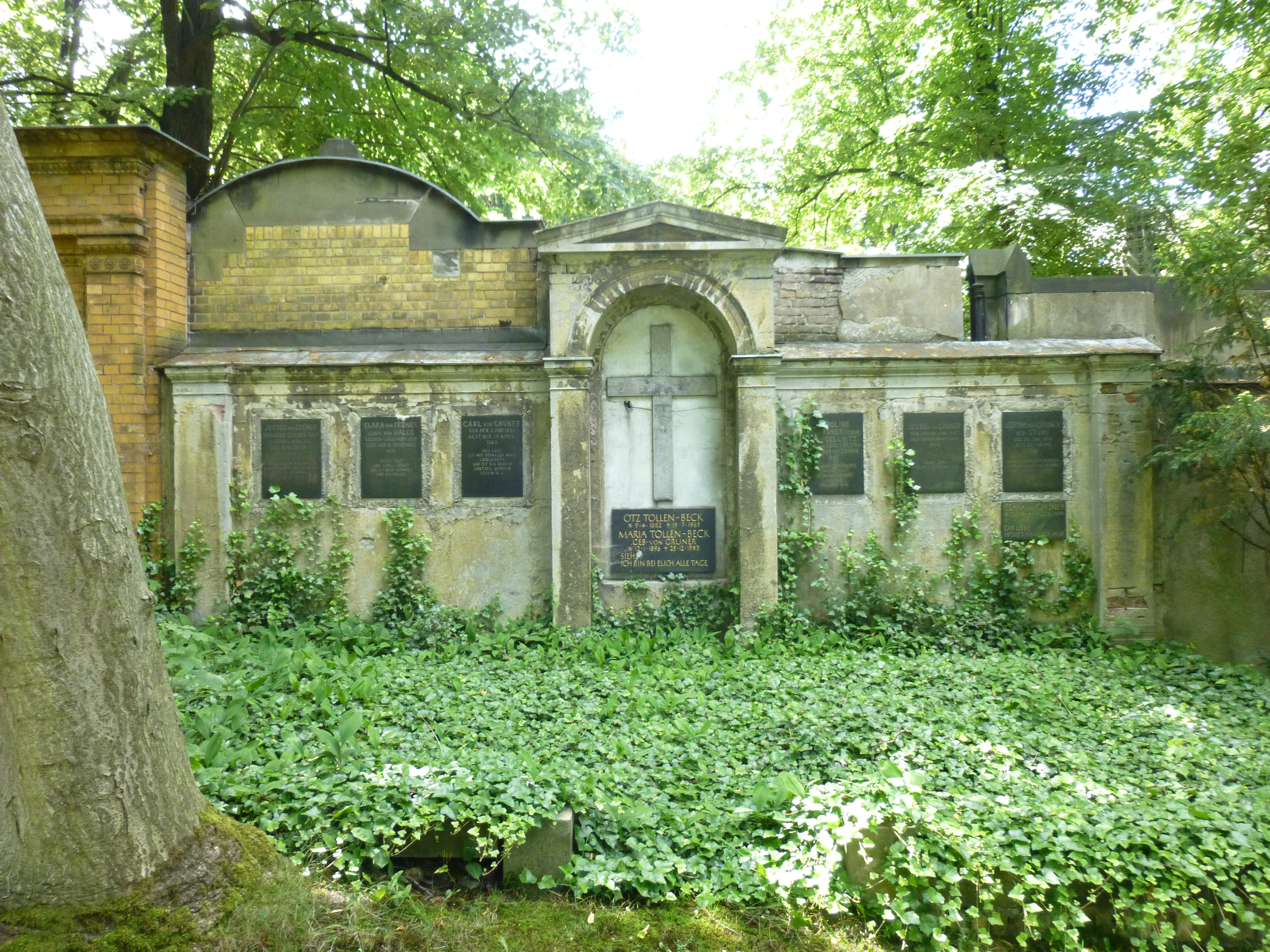 Alter St.-Matthäus-Kirchhof Berlin, Familiengrab Justus von Gruner / Foto: Wolfgang Schindler